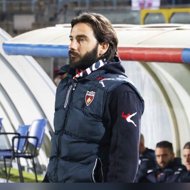 foto allenatore